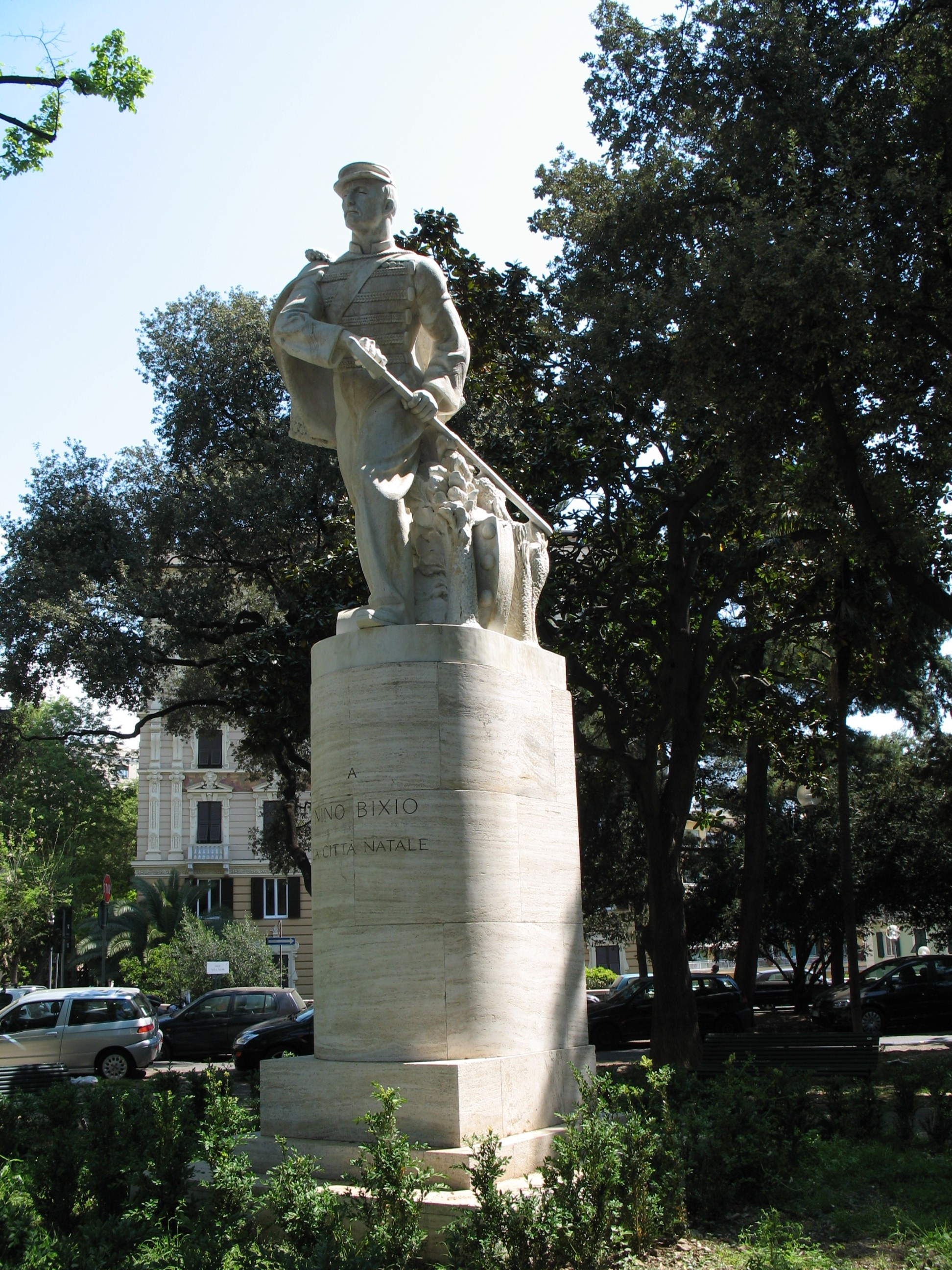 Genova, quartiere di Carignano, via Corsica - statua a Nino Bixio